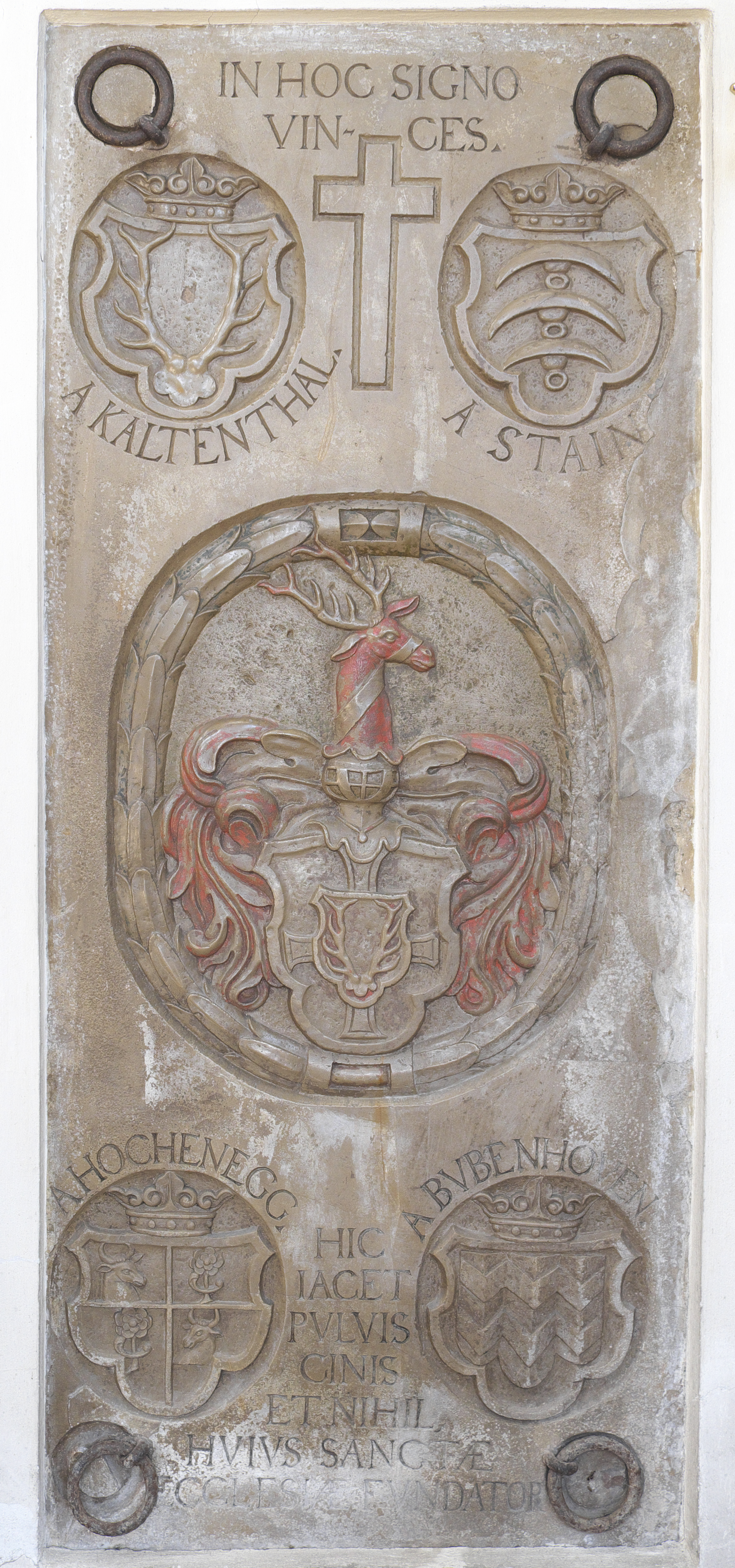 Wallfahrtskirche Maria Birnbaum in Sielenbach im Landkreis Aichach-Friedberg (Bayern), Epitaph für den Stifter Philipp Jakob von Kaltenthal (gest. 1669), mit den Wappen der Familien Kaltenthal, Stain, Hohenegg und Bubenhofen